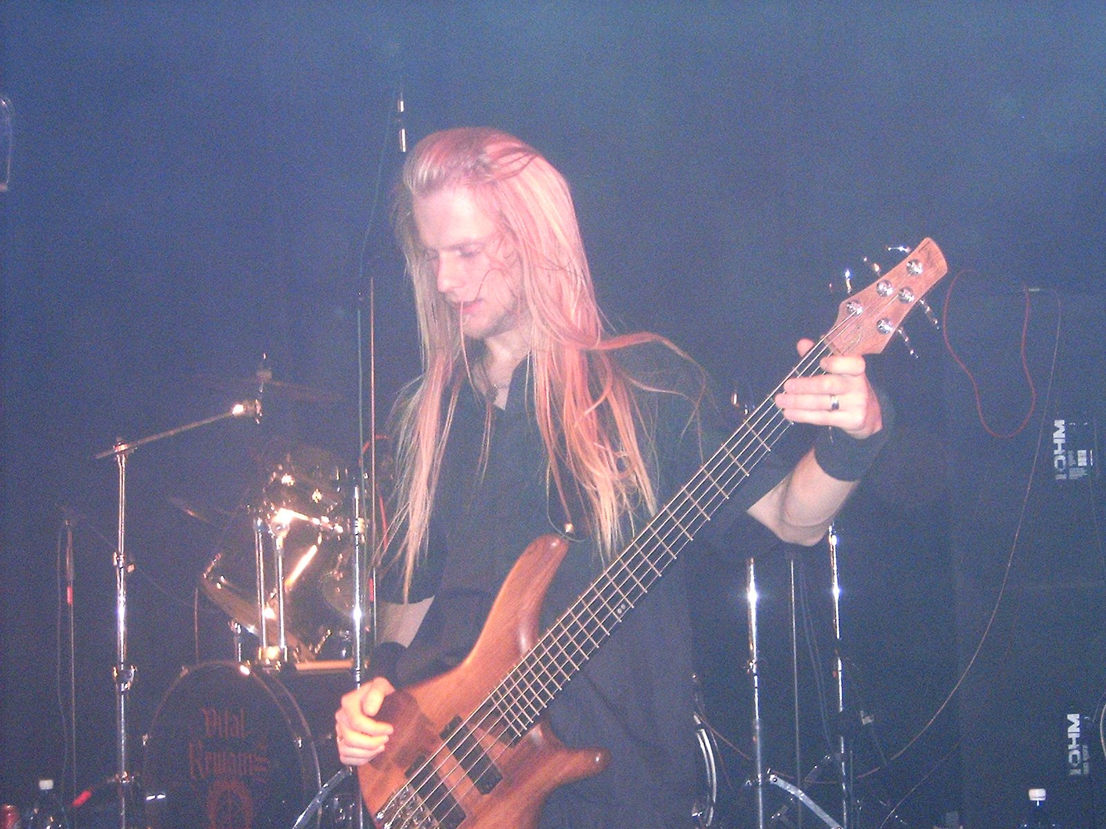 Pawel "Firana" Krajnik member of Trauma - polish death metal band